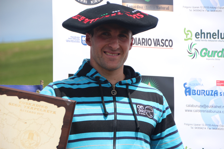 Julen Gabirondo 2017ko abuztuaren 6an Asteasun irabazi zuen Euskal Herriko sega txapela buruan duela.